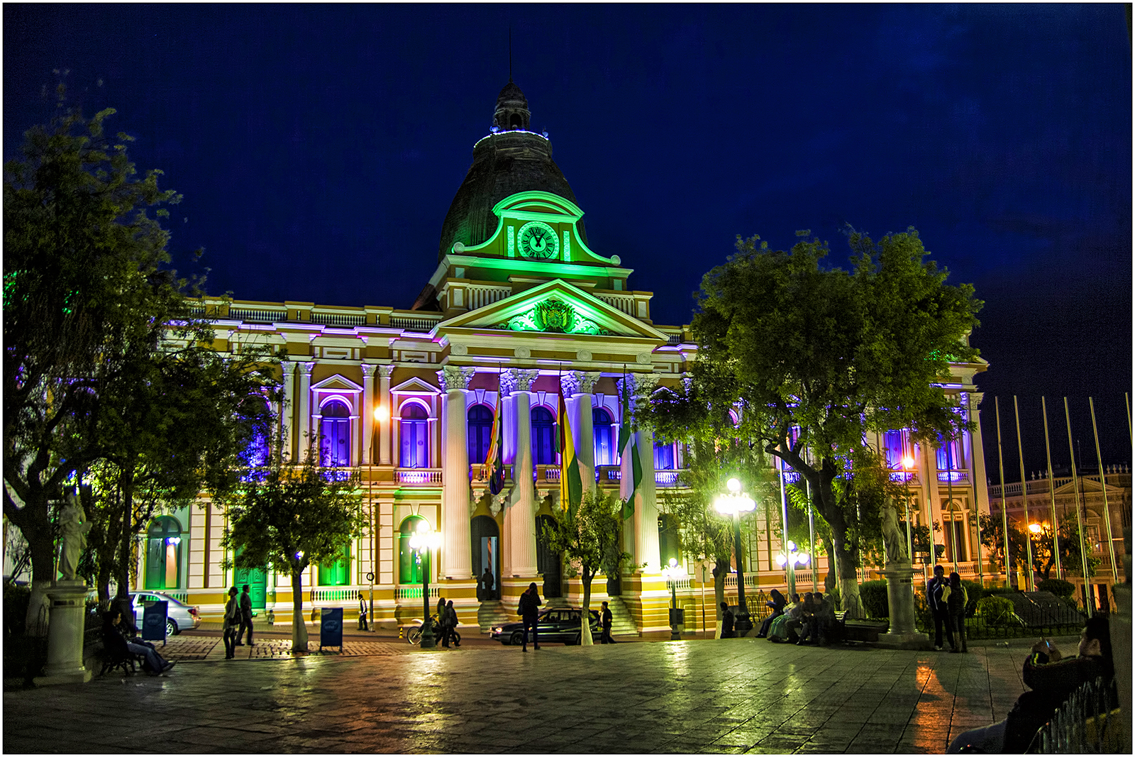 El Palacio de Gobierno se viste de colores en homenaje al aniversario del Departamento Hermano de Santa Cruz.